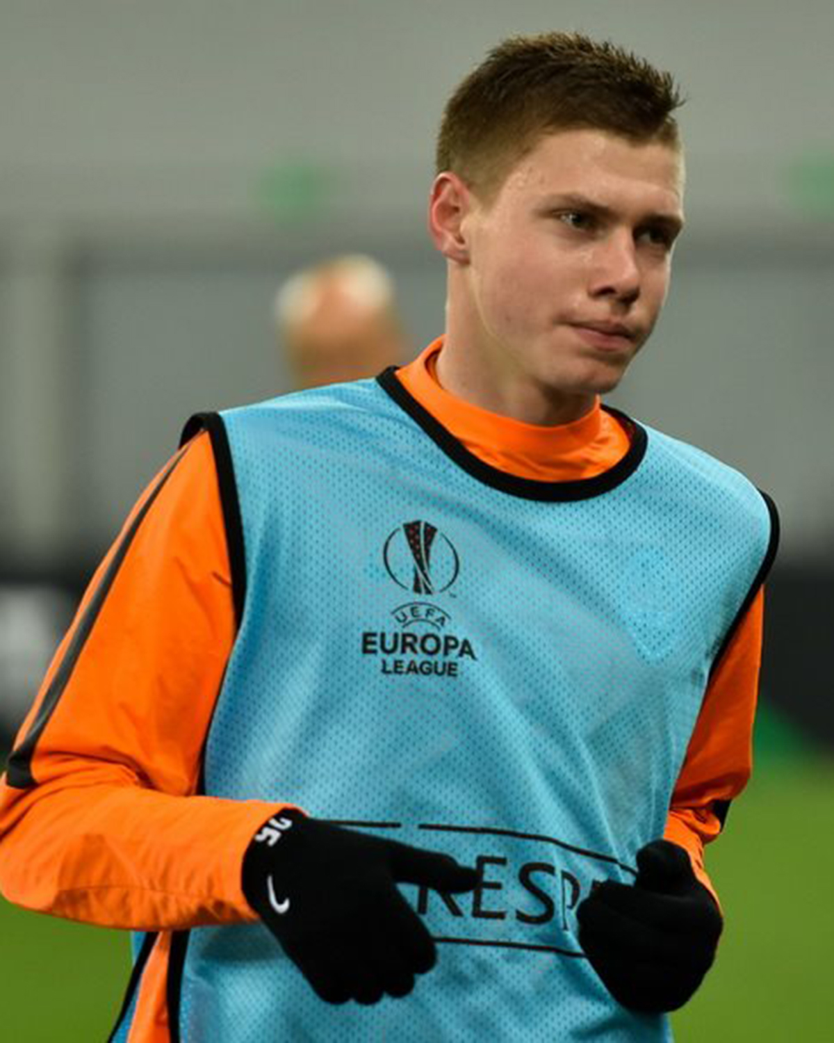 Николай Матвиенко — украинский футболист